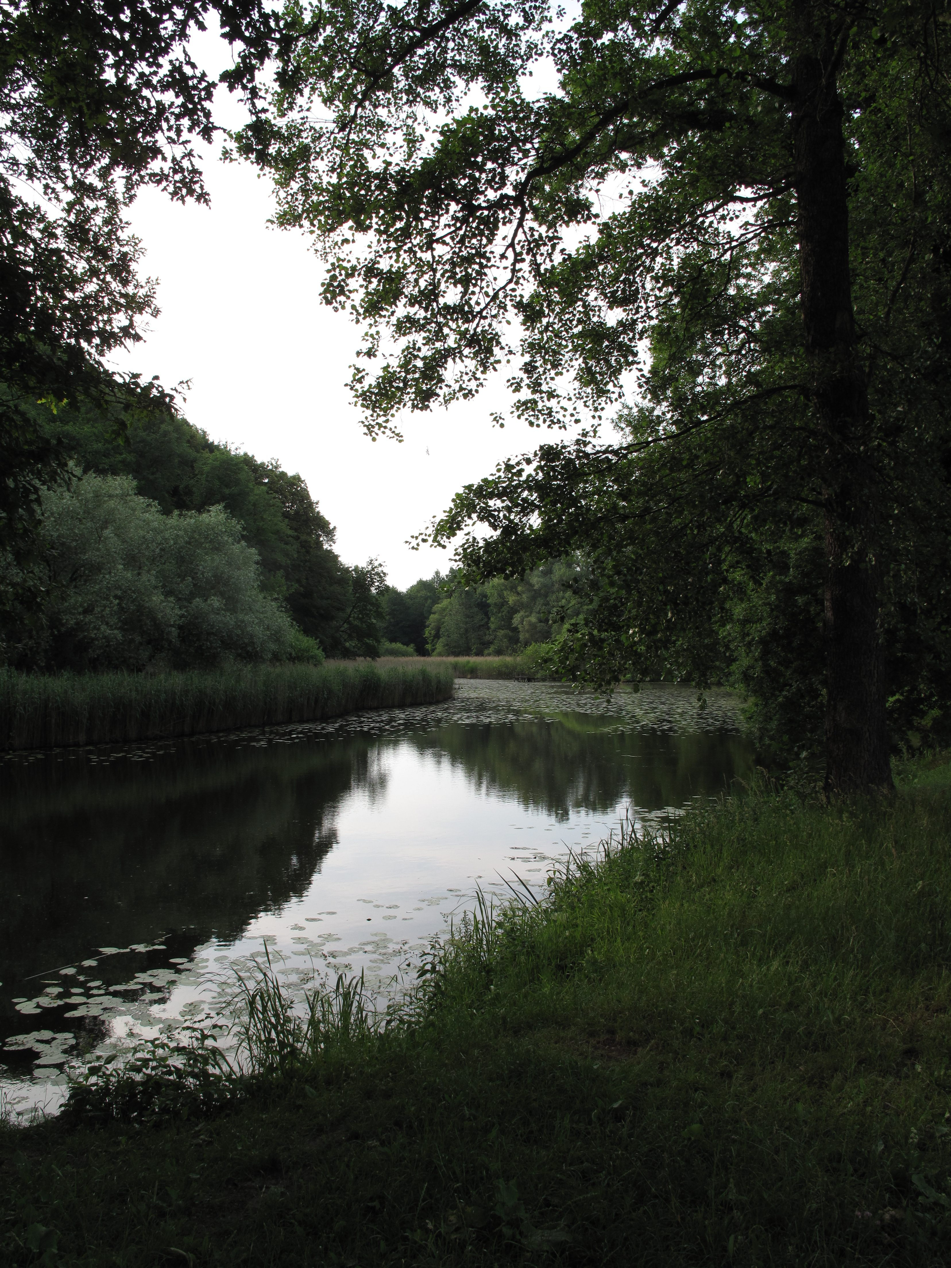 Rameno Labe v přírodní rezervaci Na hornické. Okres Kutná Hora, Česká republika.